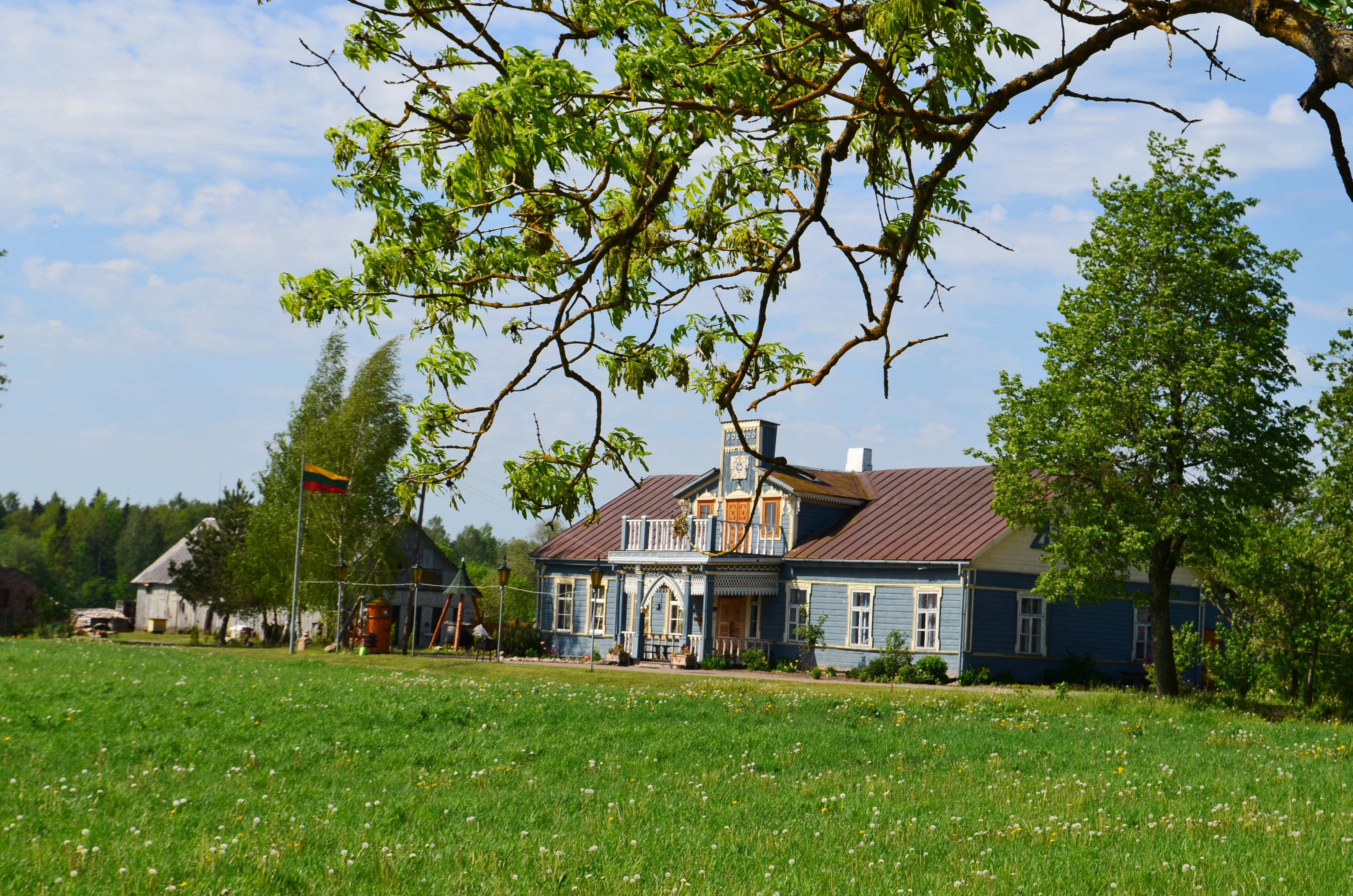 Vincgalio dvaro rūmai, Kėdainių r.